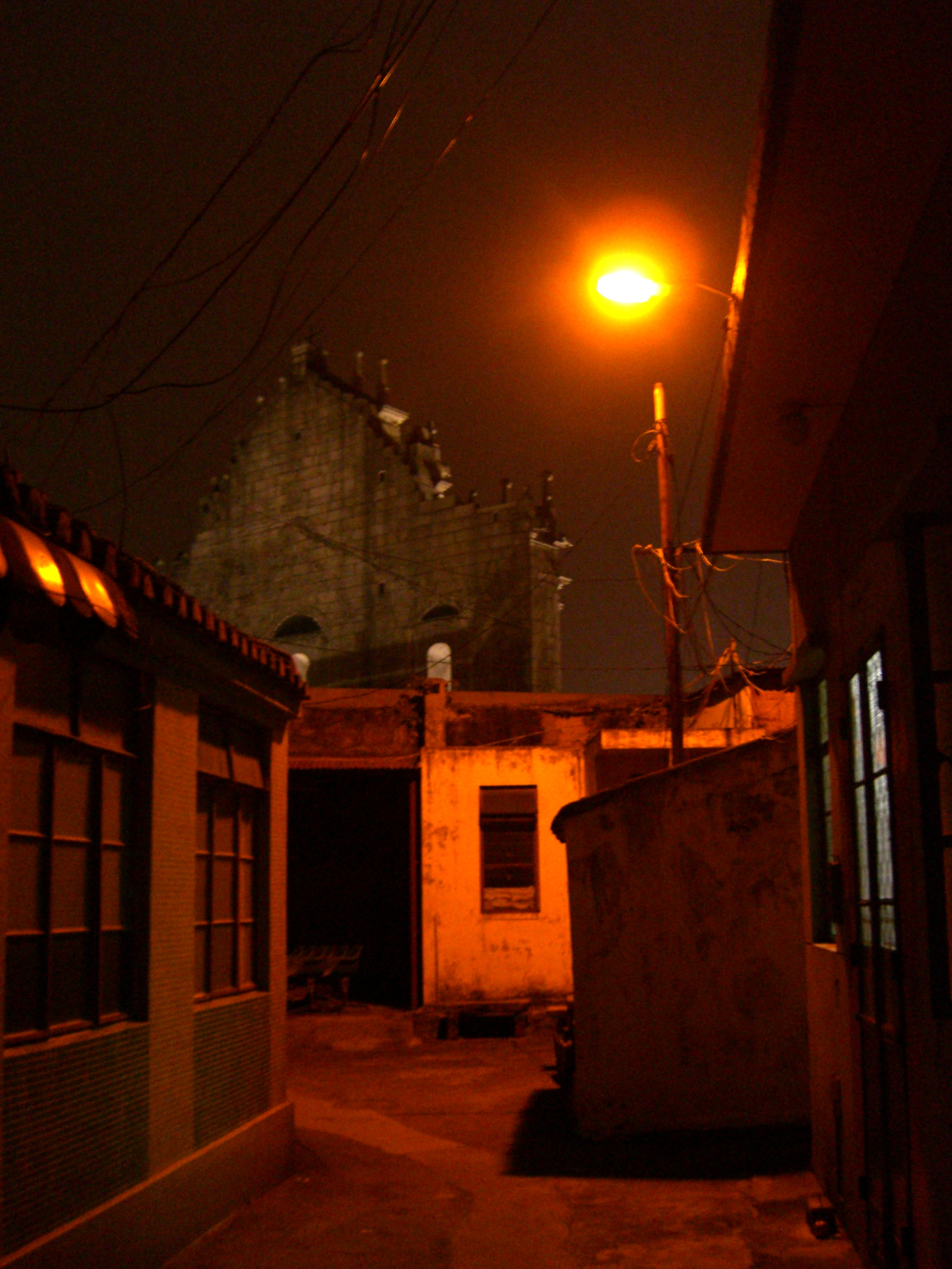 Patio Do Espinho